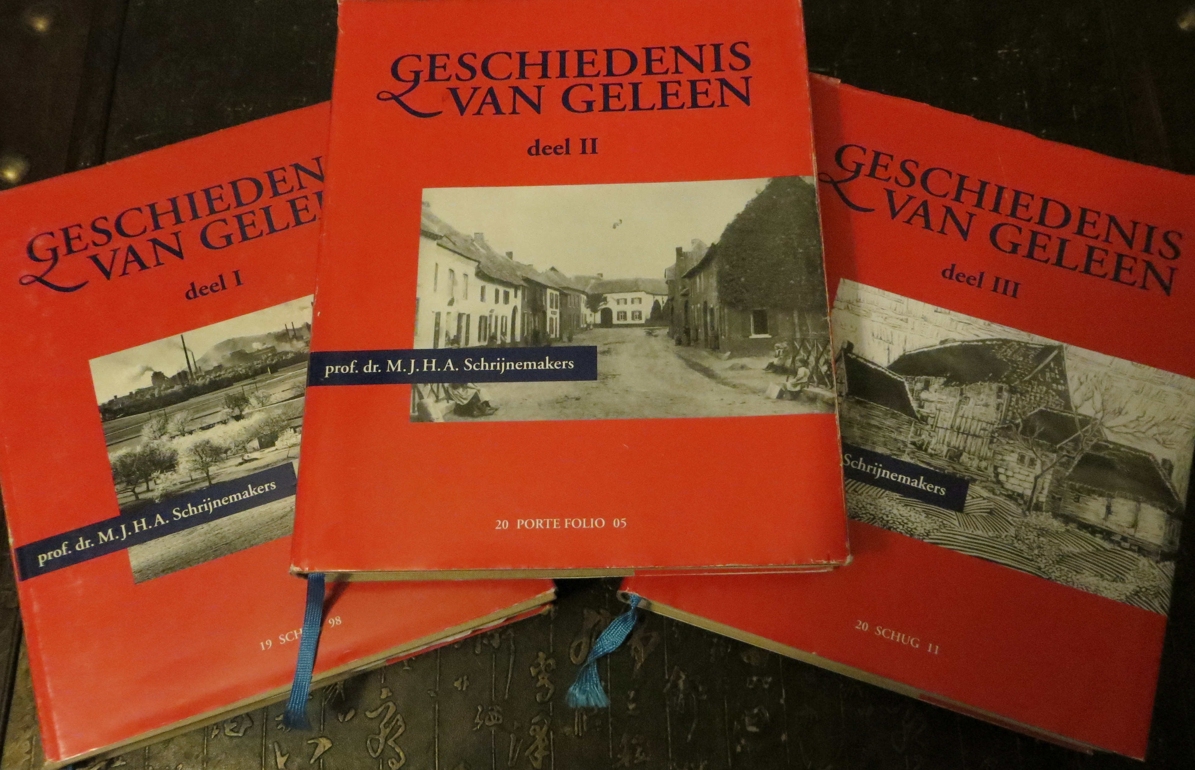 Eigen foto boeken Schrijnemakers